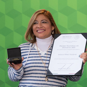 Premio Nacional de Deportes y Premio Nacional de Mérito Deportivo 2015. Residencia Oficial de Los Pinos 26 de Enero de 2016.